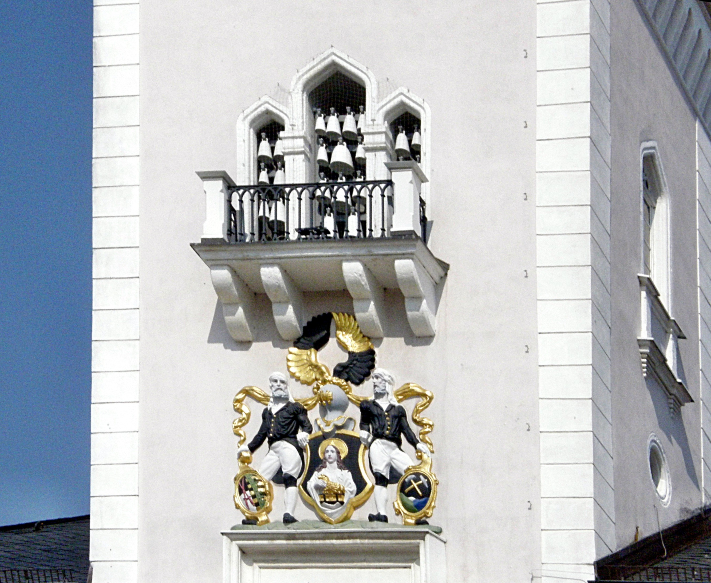 Schneeberg, Rathaus: Glockenspiel